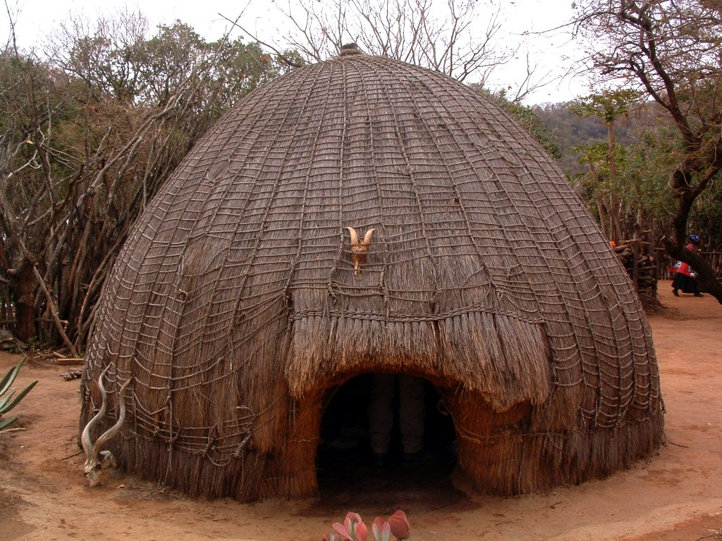 Hutte traditionnelle Swazilandaise (village touristique) août 2006, photo personnelle Catégorie:Eswatini